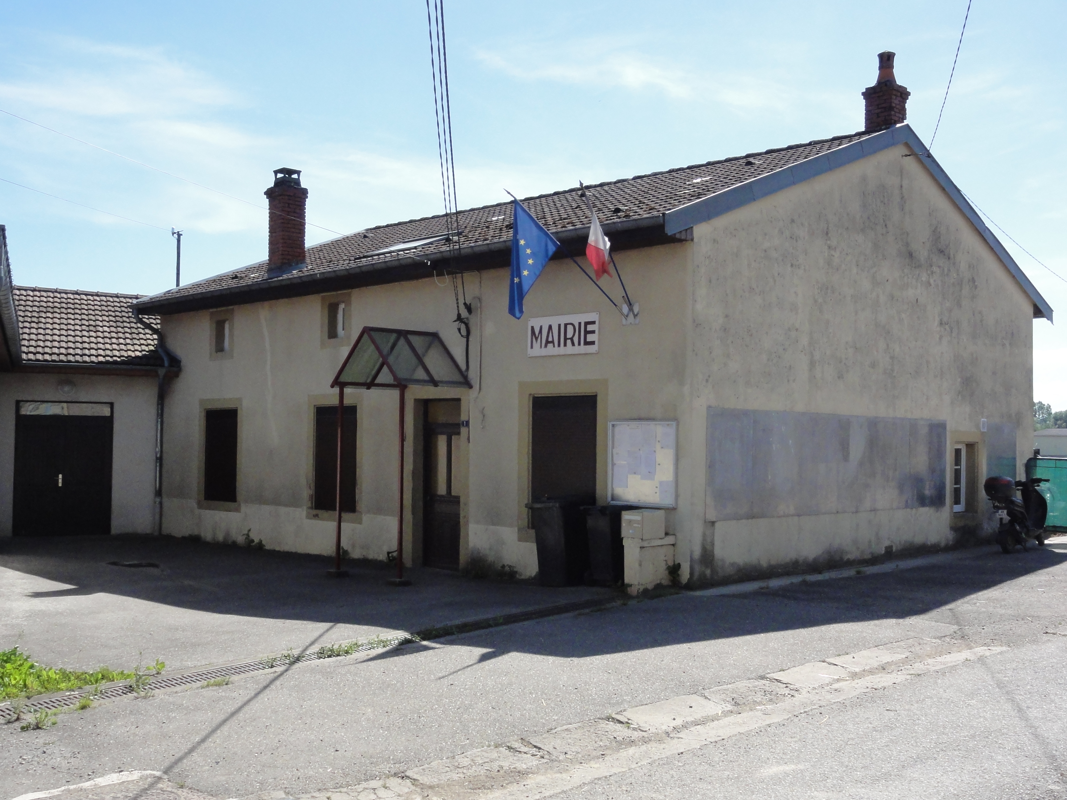 Vaxainville (M-et-M) mairie